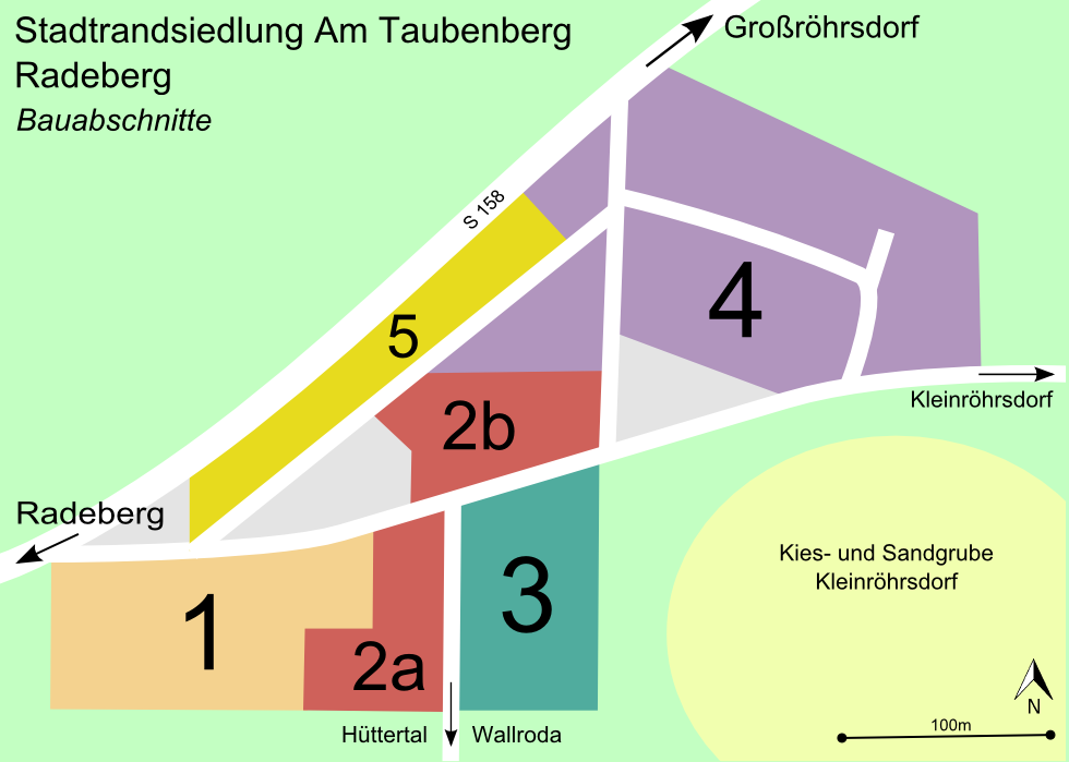 Karte der Bauabschnitte der Stadtrandsiedlung Radeberg